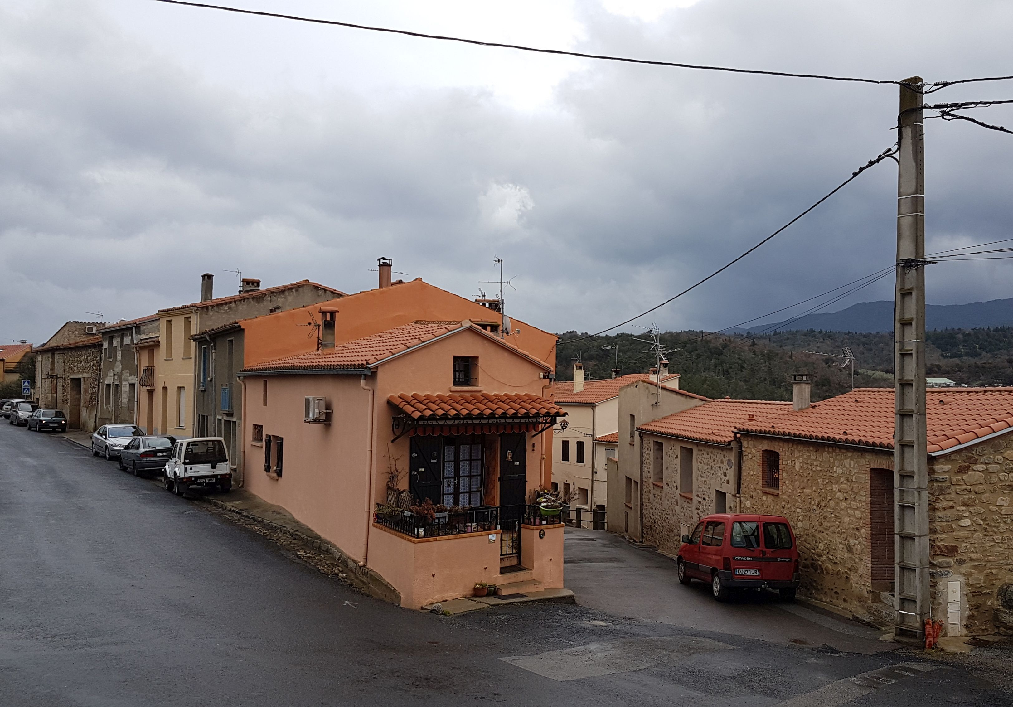 Vue générale de Llonat à Los Masos